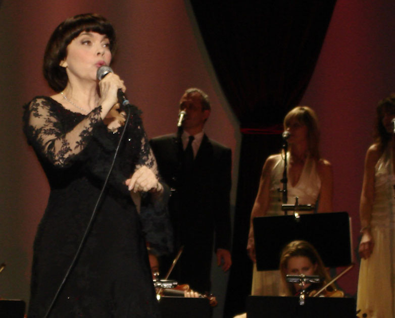 Mireille tijdens haar optreden in Keulen (Kölnarena) op 12 april 2008